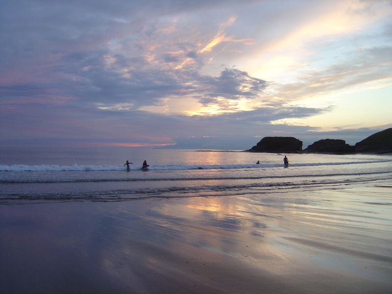 Badespaß bei Sonnenuntergang am Strand von Bundoran im Nordwesten von Irland - Region Sligo